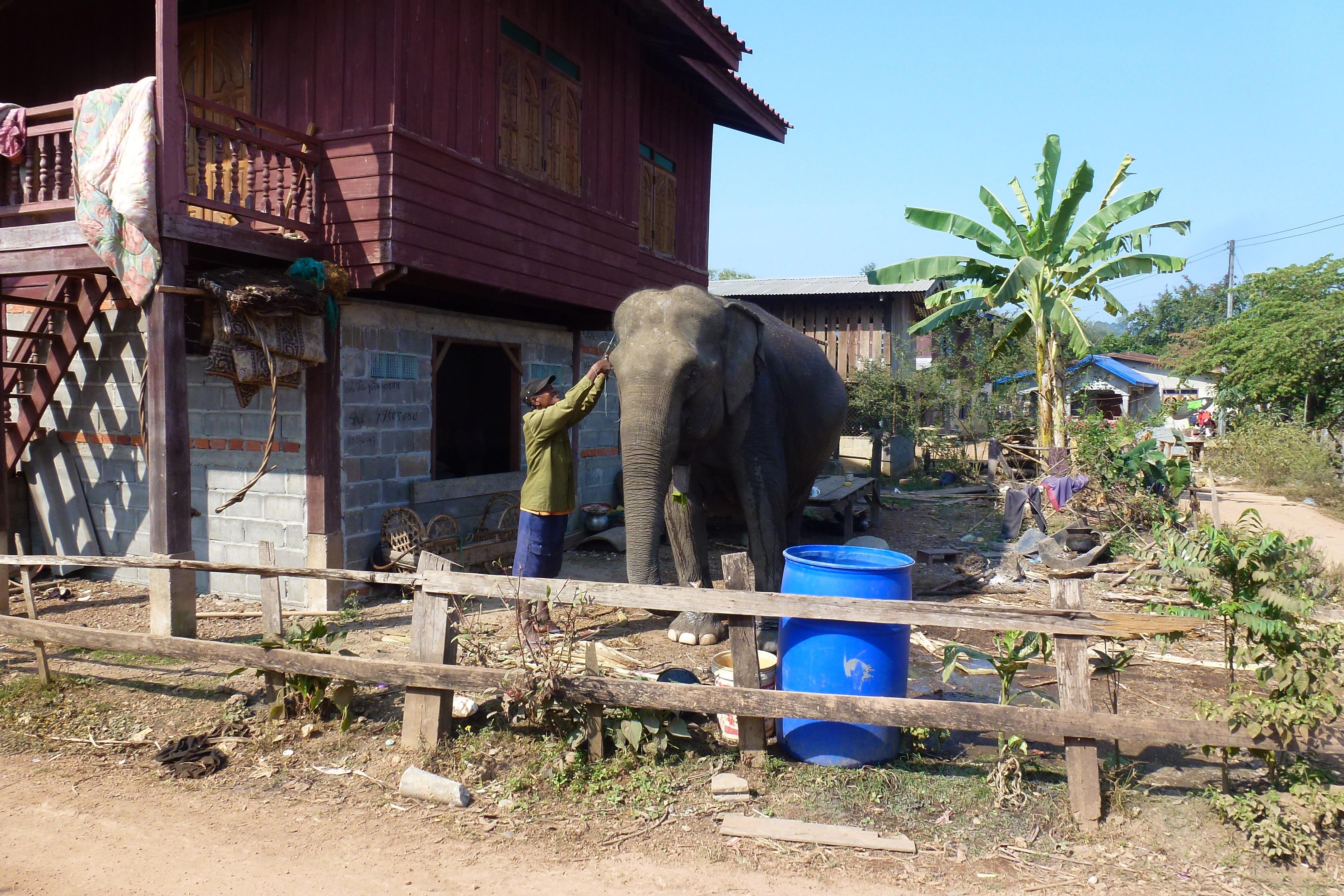 Khong Island Phou Asa Mountain (Trek à dos d'éléphants)Laos.